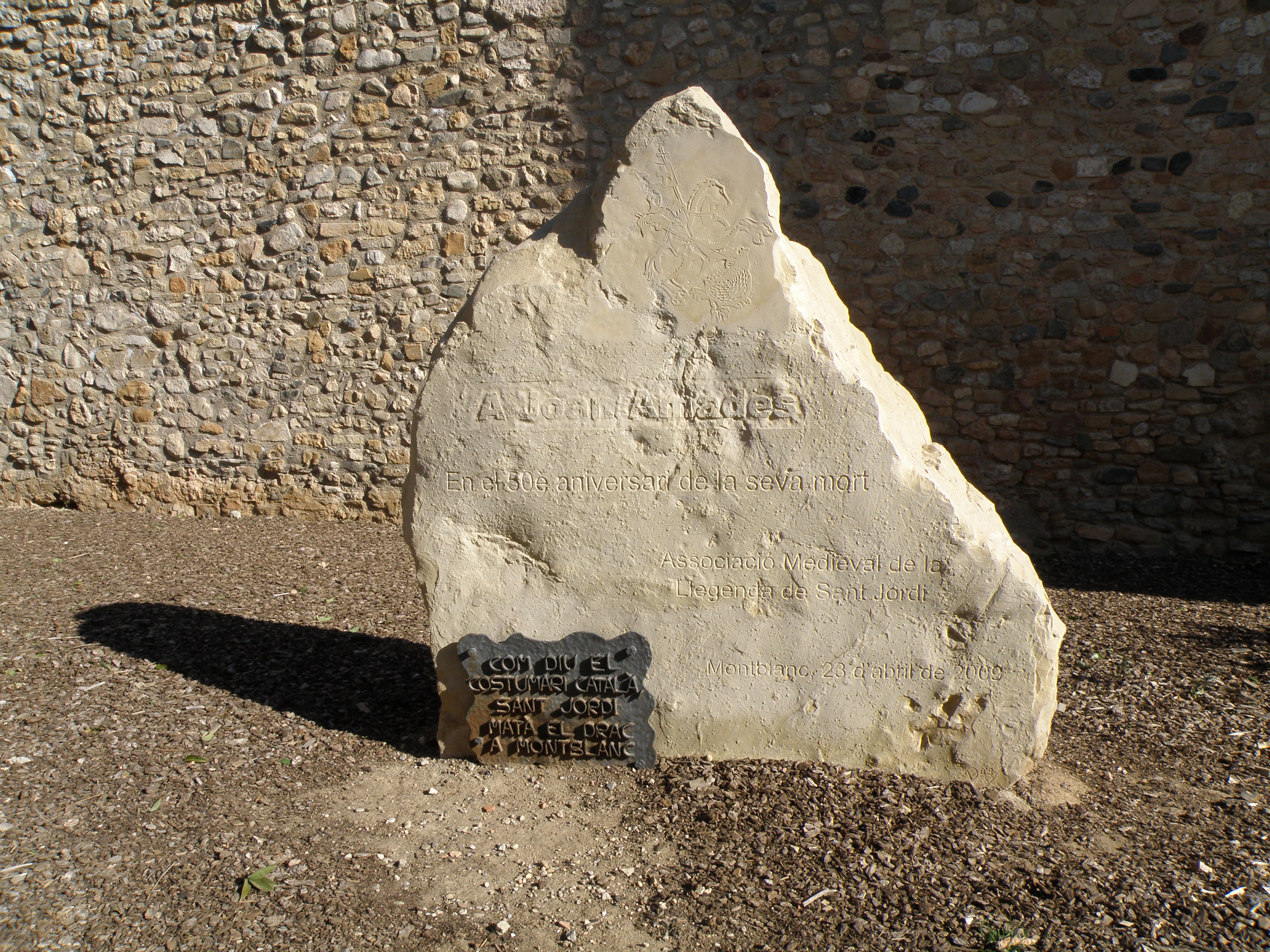 Monument a Joan Amades en front a les muralles de Montblanc, Conca de Barberà.